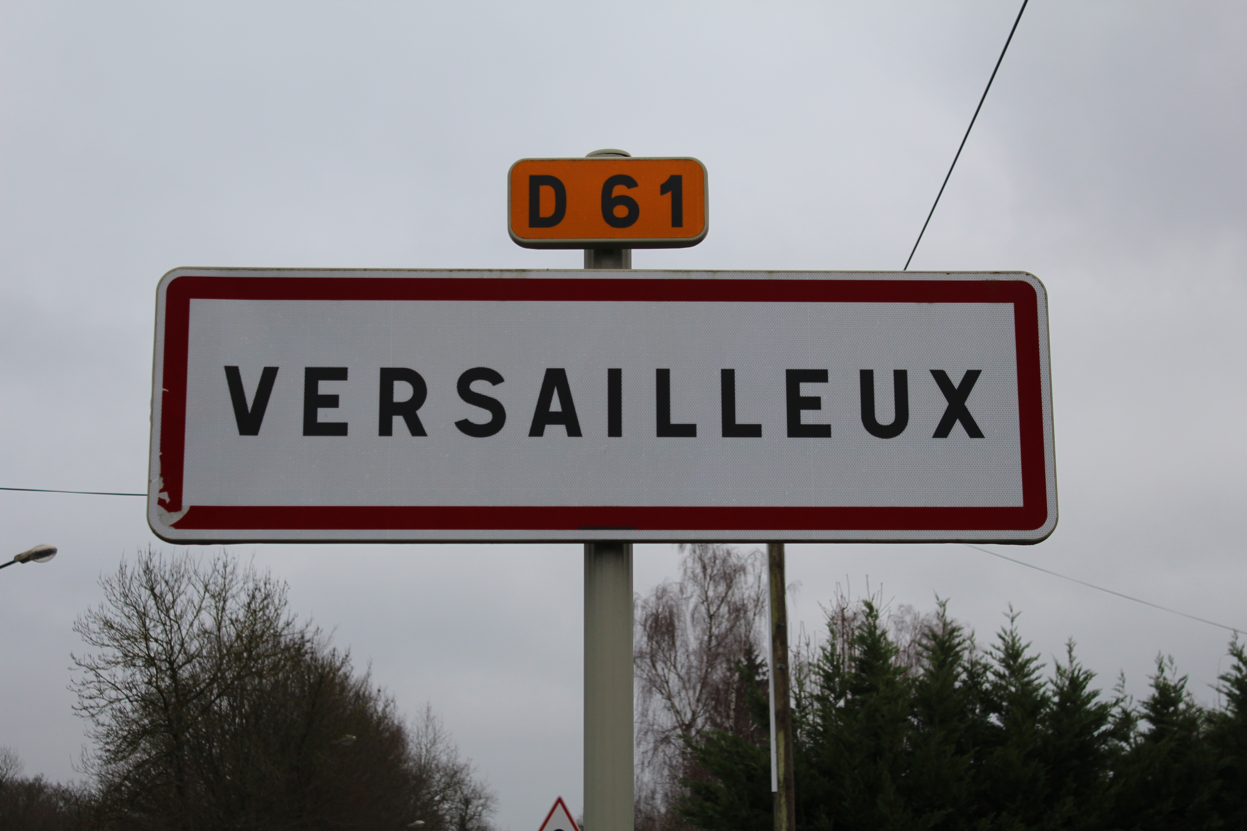 Panneau d'entrée dans Versailleux.